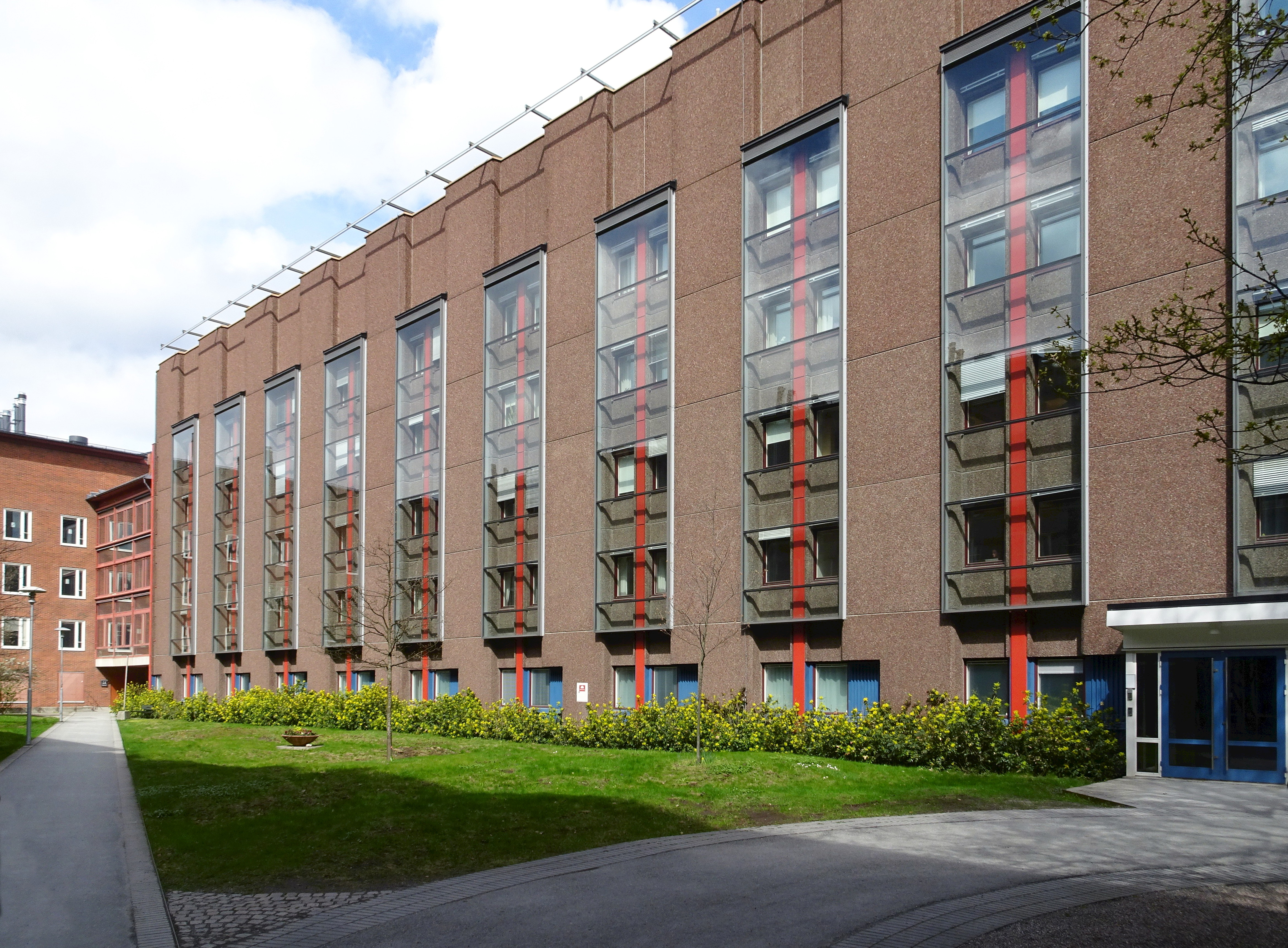 Berzeliuslaboratoriet och bibliotek, Huvudentré Berzelius väg 3, byggår 1972, arkitekt O.Hidemark, G.Månsson, L.Olsson